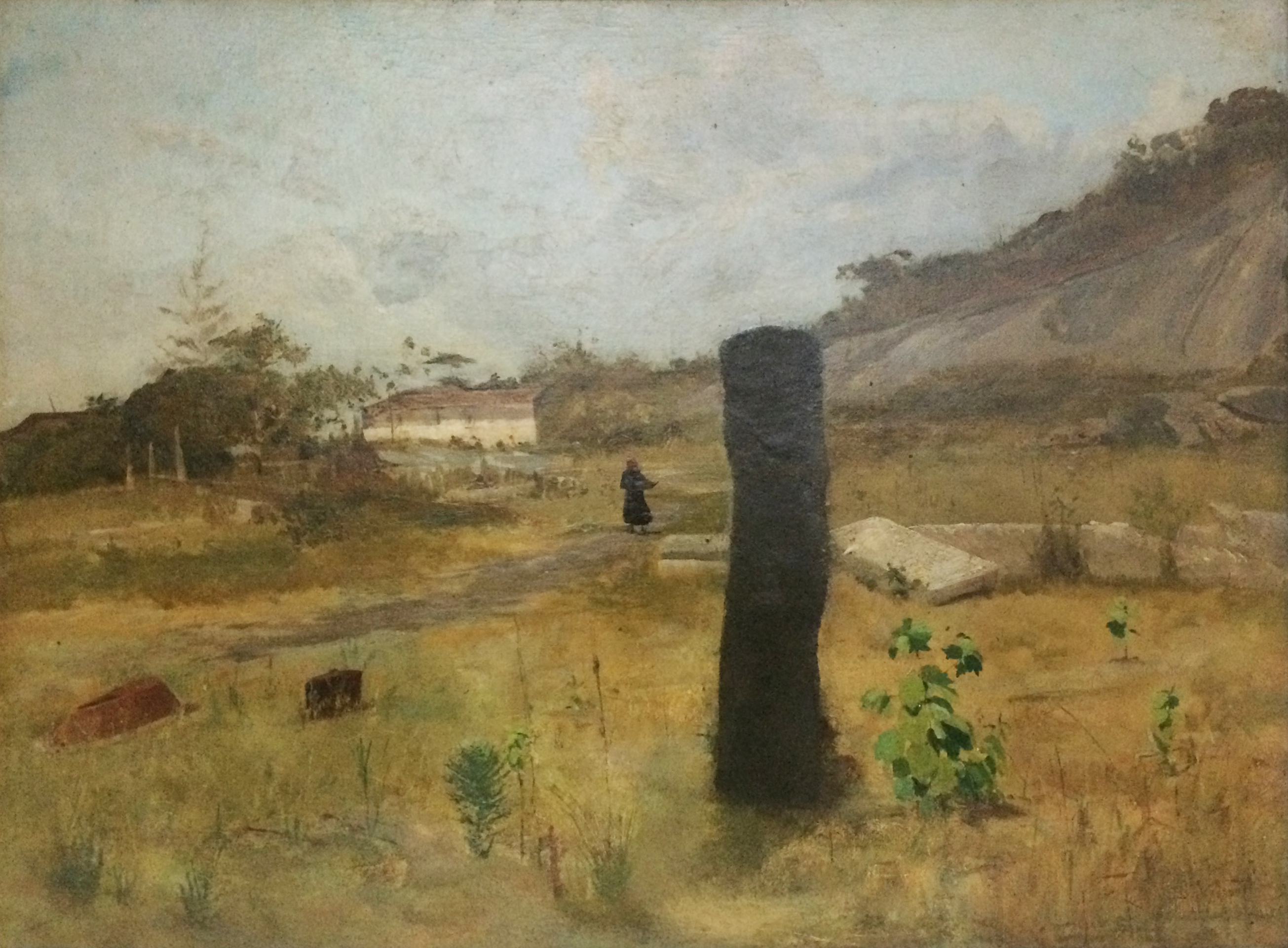 Obra do Projeto Eliseu Visconti